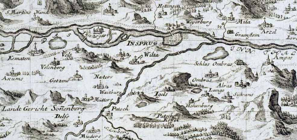 Curioses Staats und Kriegs Theatrum Dermahliger Begebenheiten im Tyrol : durch Unterschiedliche Geographische, Hydrographische, Topographische, Chronologische, Genealogische, Historische &c. Carten, Abrisse, und Tabellen Erlaeutert, Augspurg : Stridbeck, [ca. 1700] Insprug mit der Gegend auf 2 Stunden